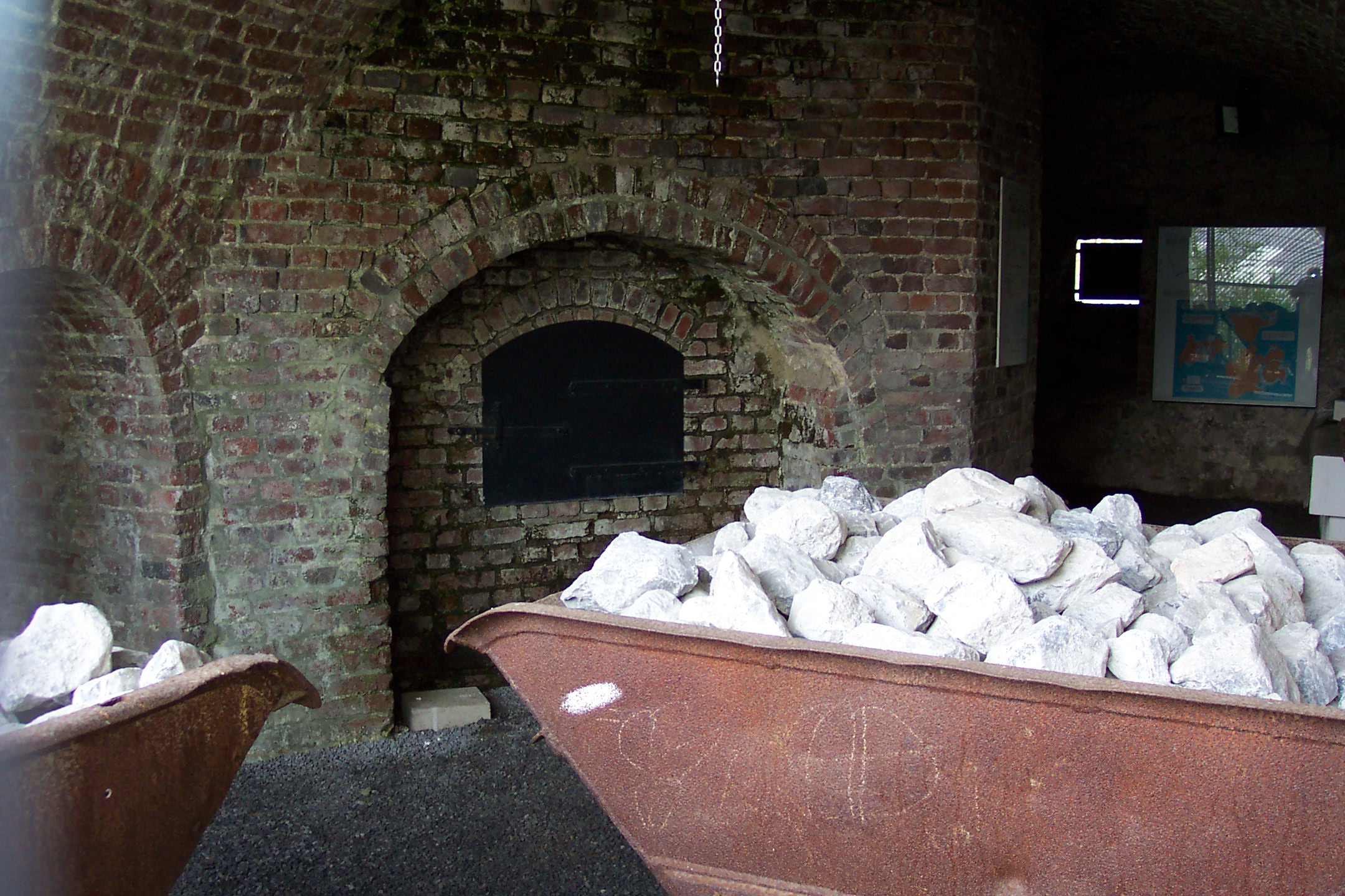 Der Eulenkopfweg, Wuppertal